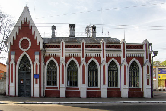 Будинок В. В. Тарновського (тепер Обласна бібліотека для юнацтва), м. Чернігів, травень 2010 року